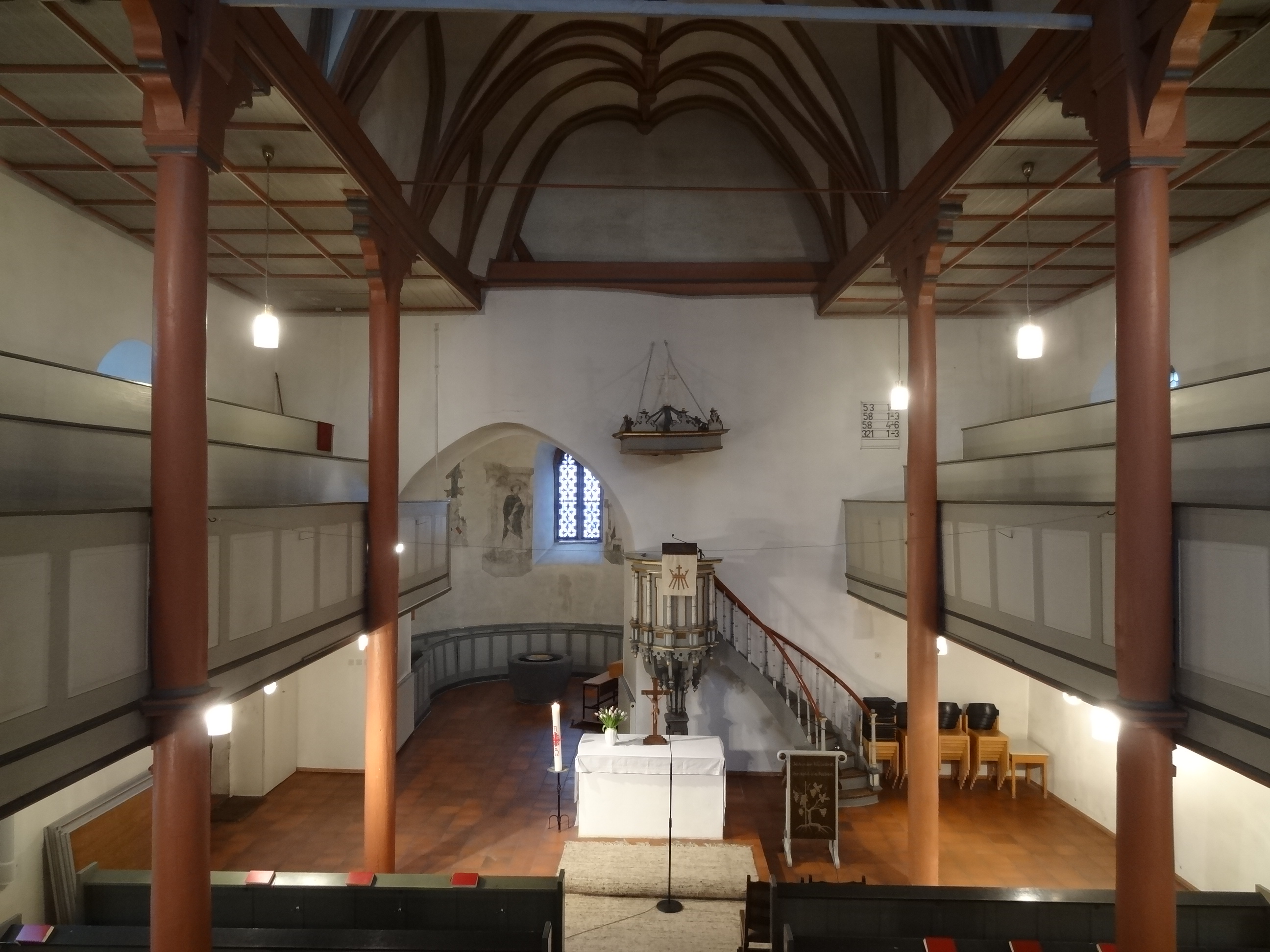 Evangelische Pfarrkirche (Hoch-Weisel)